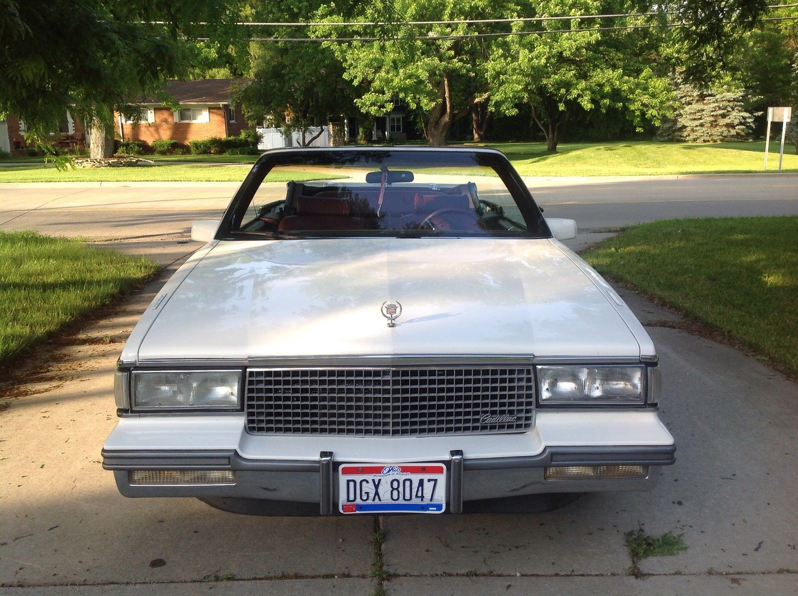 1988 Cadillac DeVille Convertable